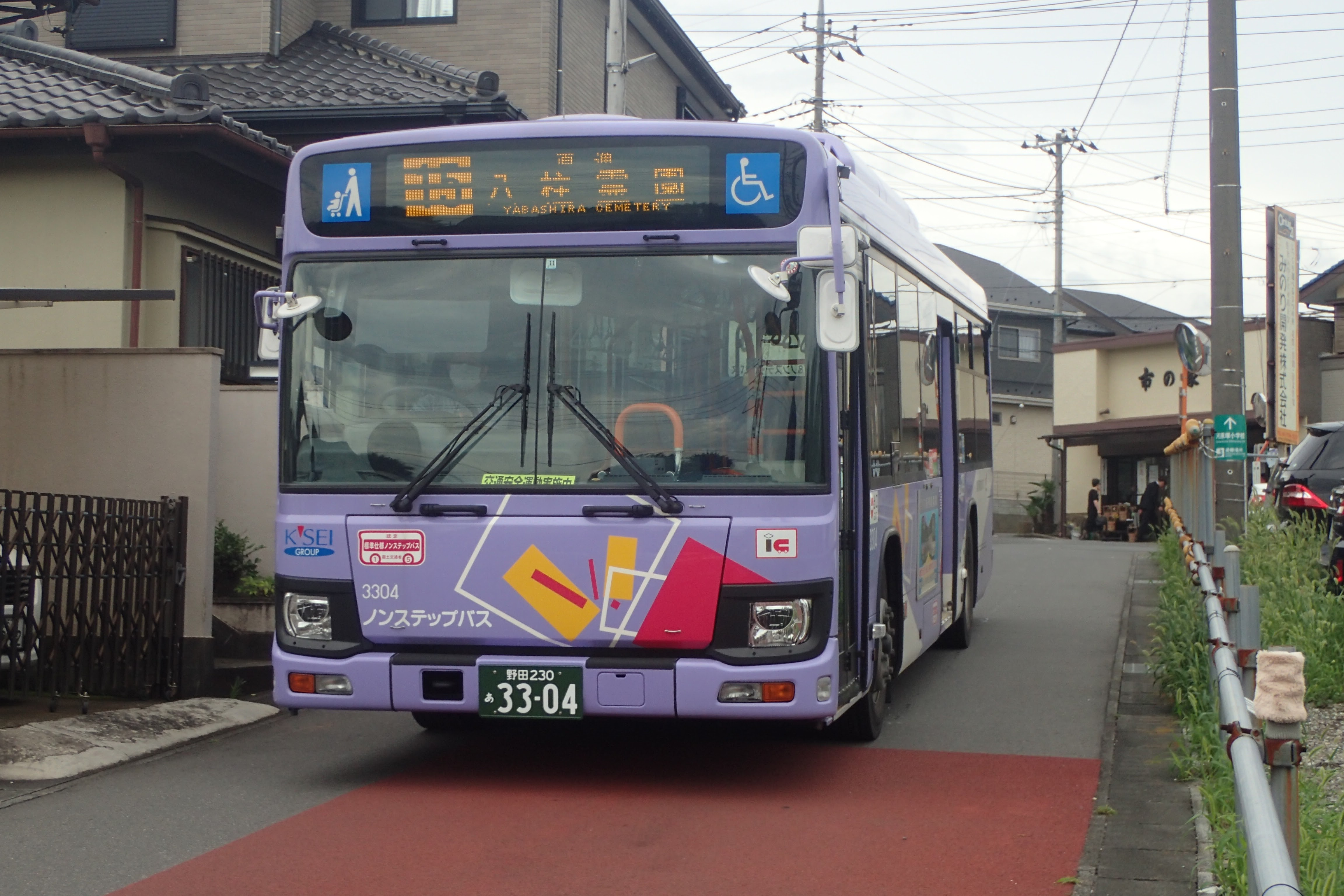 松戸新京成バス3304号車(八柱霊園バス停付近にて撮影)